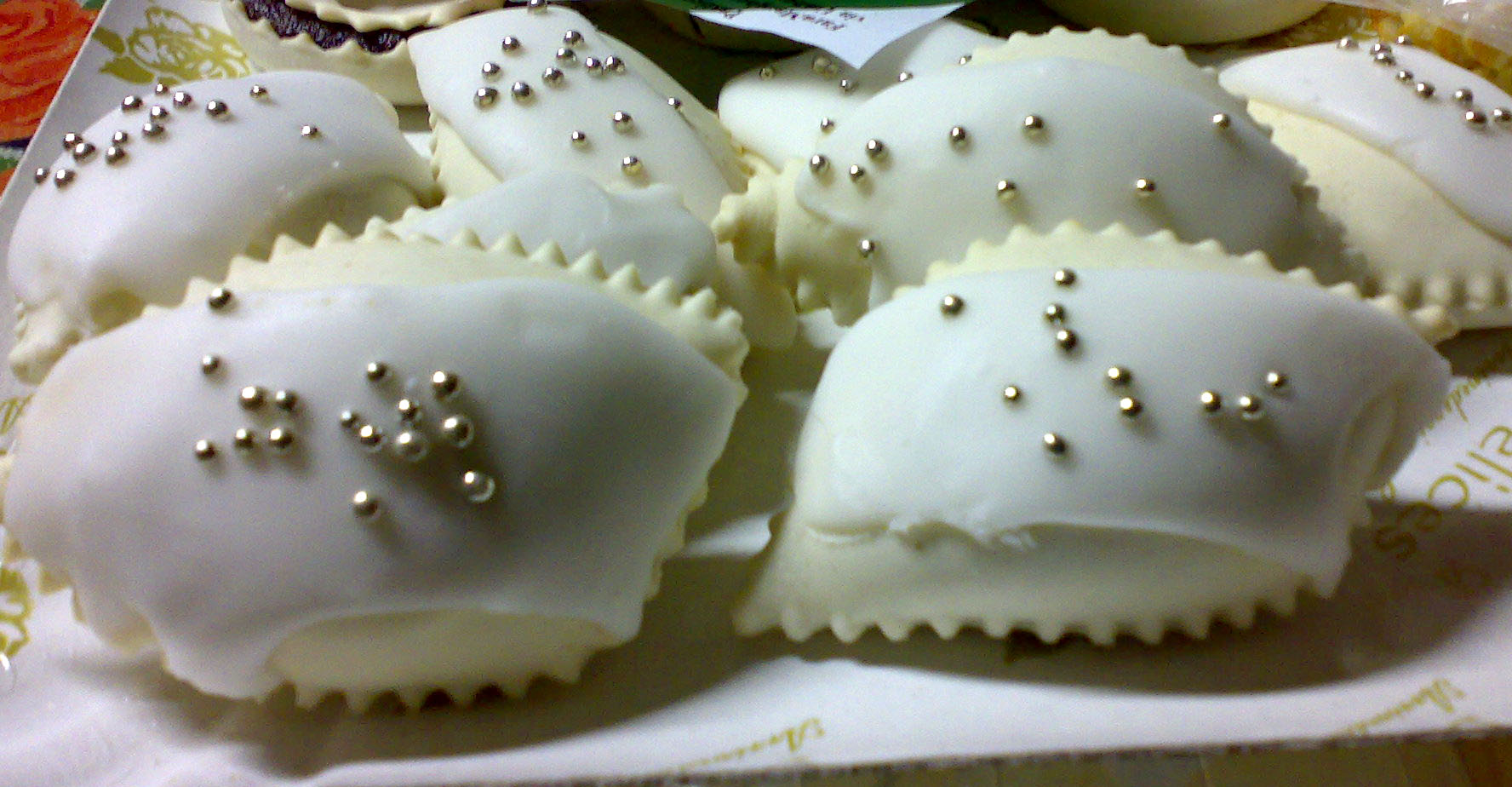 copuletas